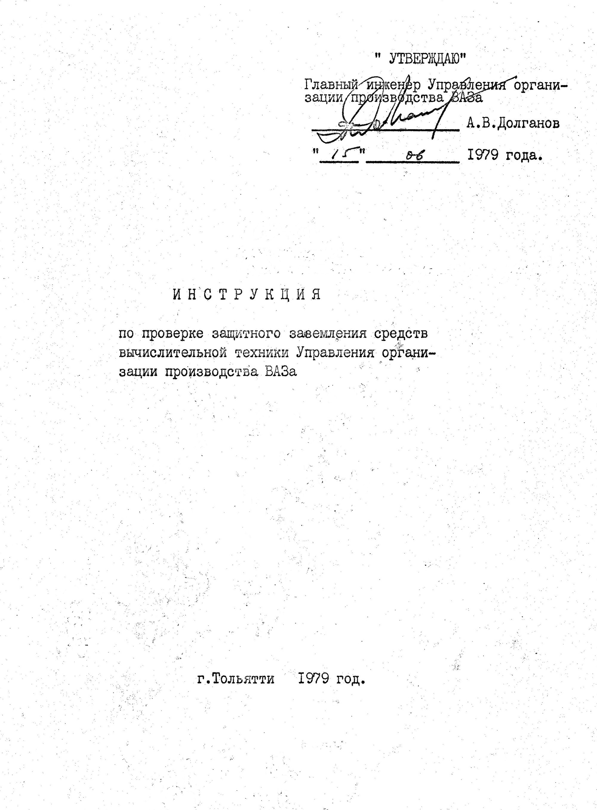 Подпись А.В. Долганова (1944—2011) на документе УОП АВТОВАЗа